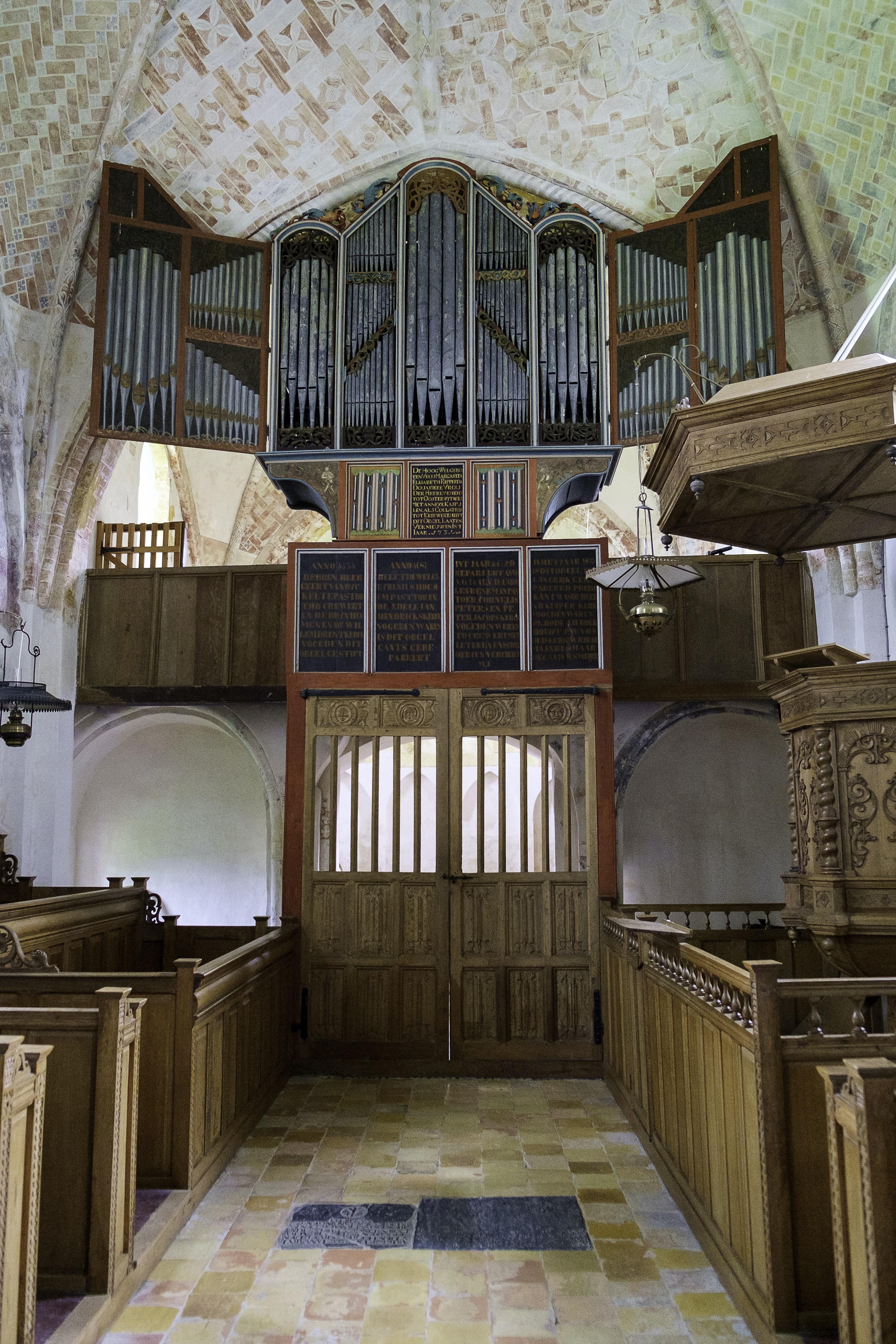 Interieur van de Mariakerk in Krewerd